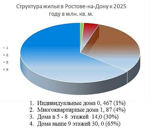 Структура жилья в Ростове на Дону к 2025 году